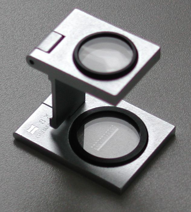 Messgerät Fadenzähler